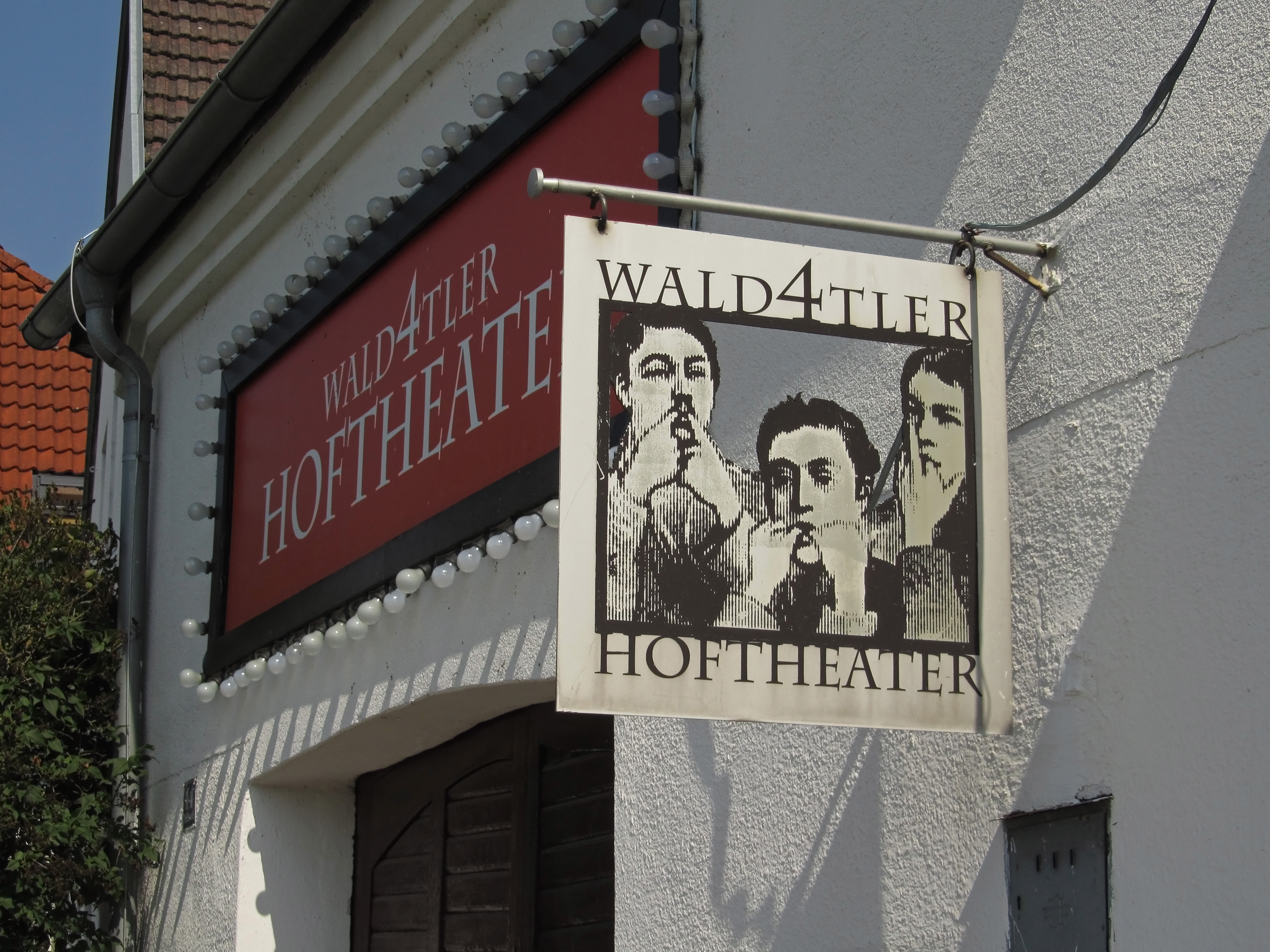 Waldviertler Hoftheater in Pürbach bei Schrems - Schild